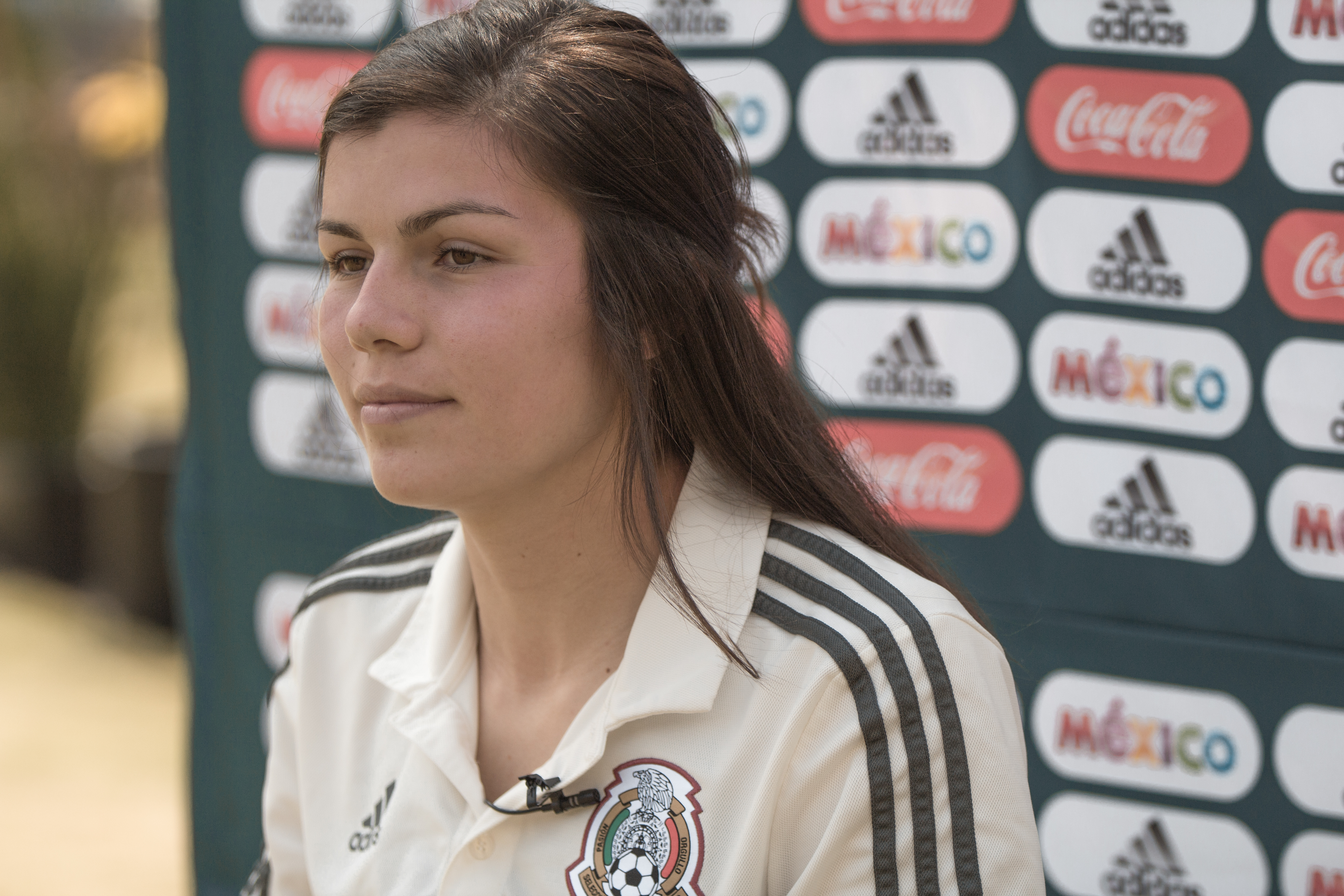 Selección Femenil de Futbol de México.